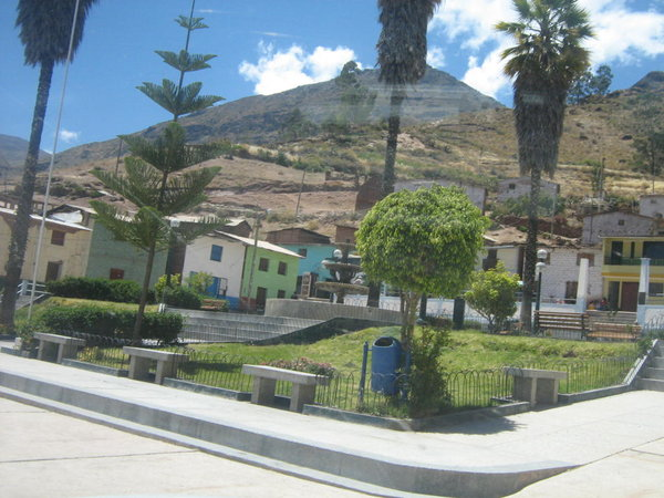 Plaza de San Pedro de Pilas, Yauyos, Lima, Perú.